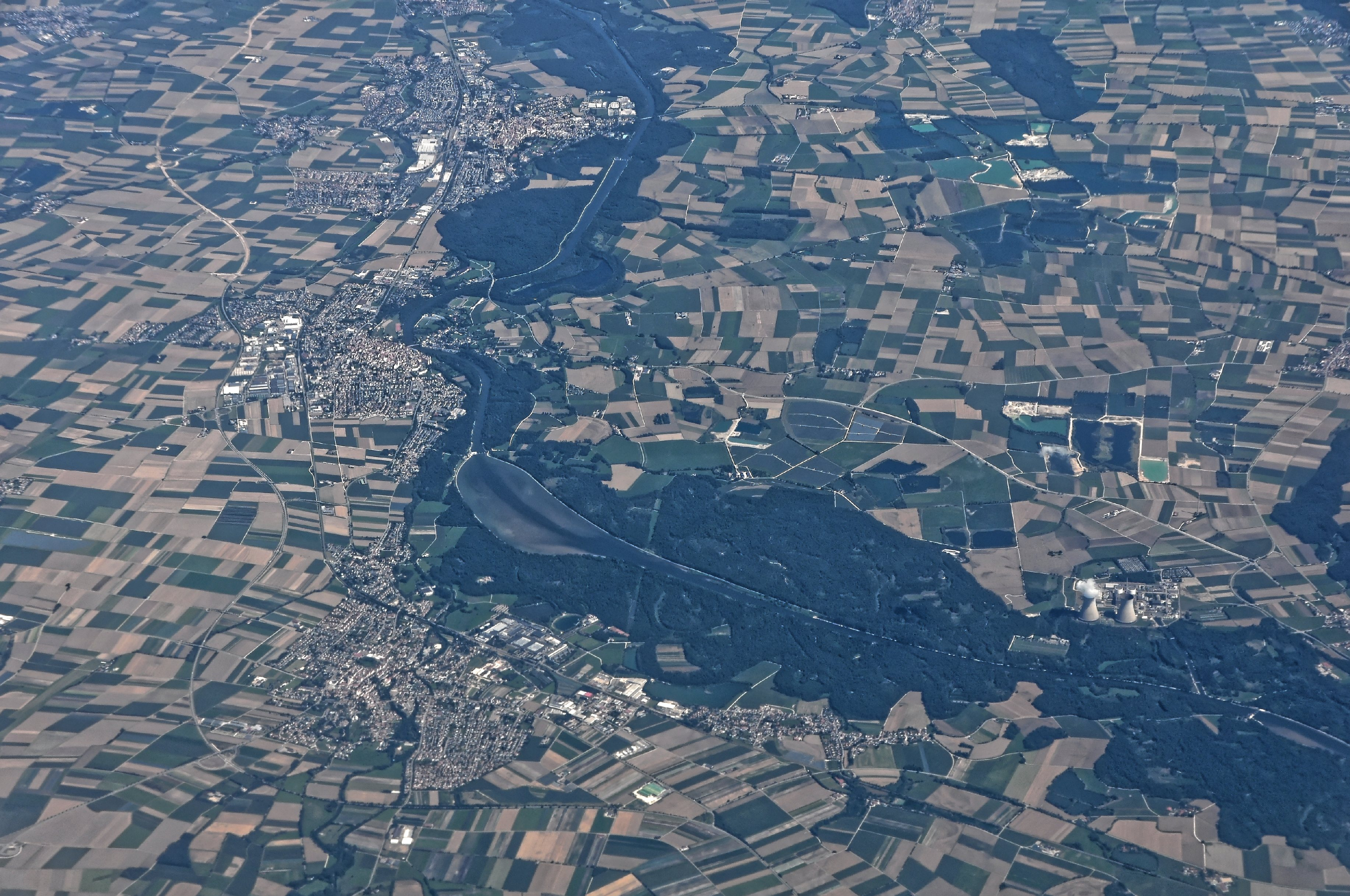 Bilder vom Flug -Rom-Düsseldorf-Hamburg 2013 Dieses Foto entstand in Zusammenarbeit mit Stadtbesichtigungen.de Die Seiten Stadtbesichtigungen.de, der dazugehörige Reise Blog sowie die Facebookseite: Stadtbesichtigungen Rom dürfen dieses Bild für Ihre Veröffentlichungen ohne den Hinweis auf Wikipedia, Commons bzw der Lizenz verwenden. Die Verantwortlichen habe von mir (Ra Boe) die Originaldaten zur freien Verfügung übermittelt bekommen.